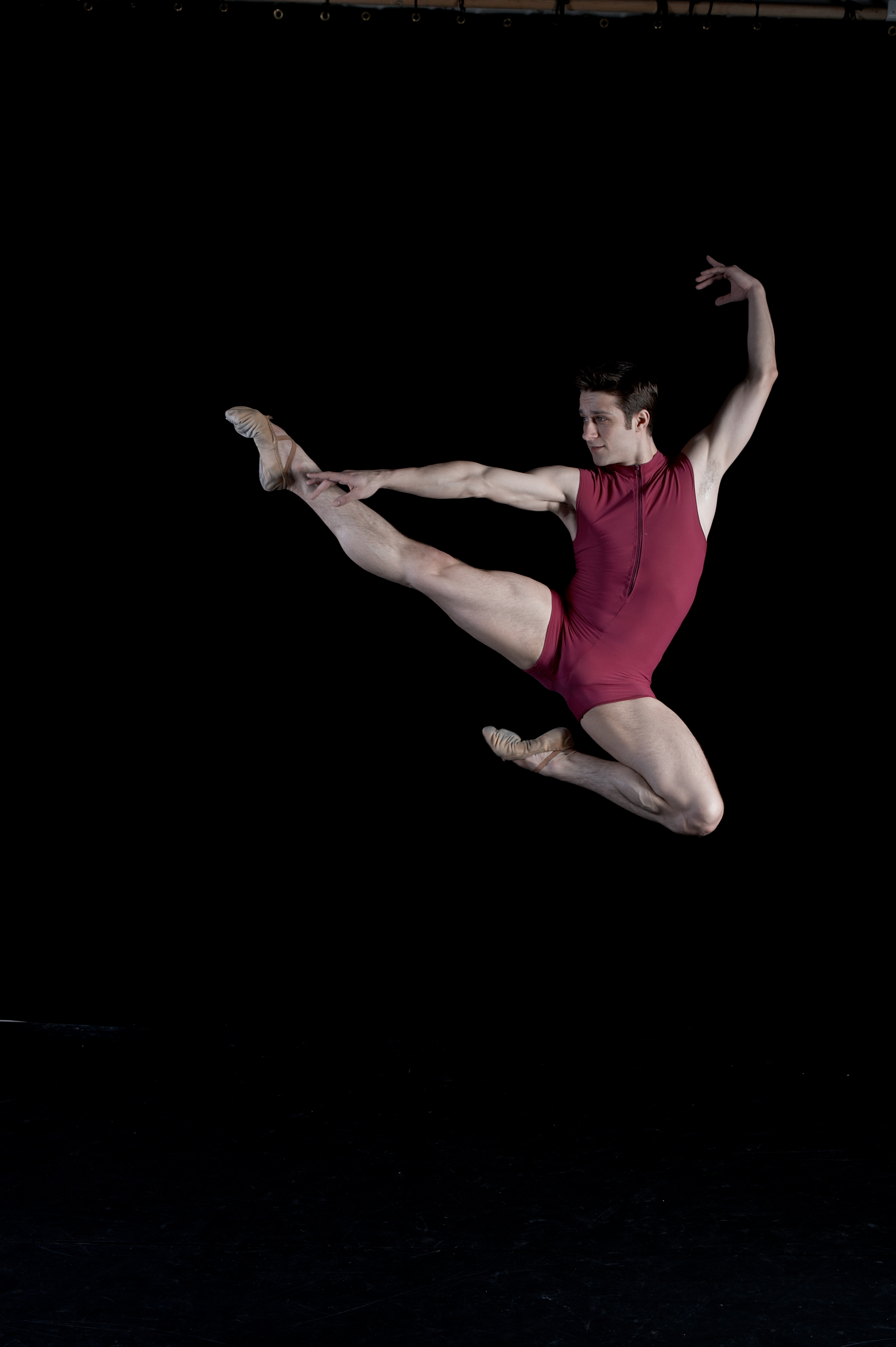 Boris Nebyla bei einem Photoshooting